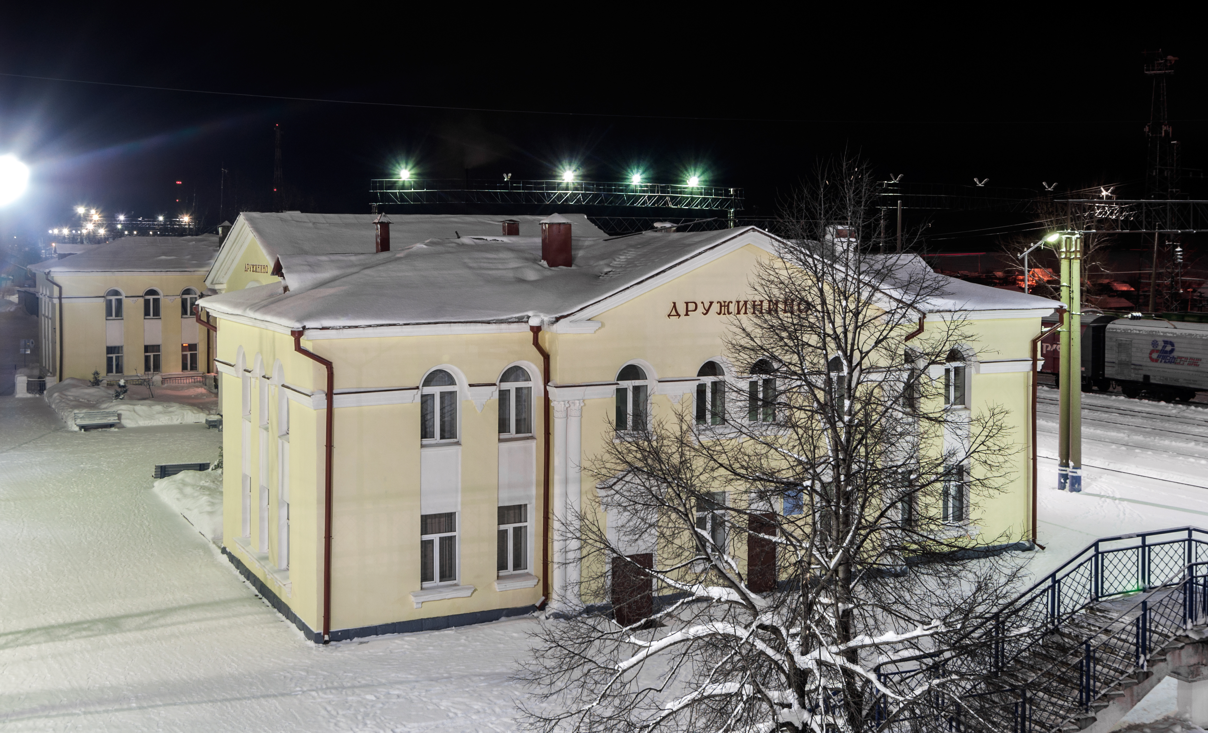 Здание железнодорожного вокзала: Дружинино, Нижнесергинский район, Свердловская область